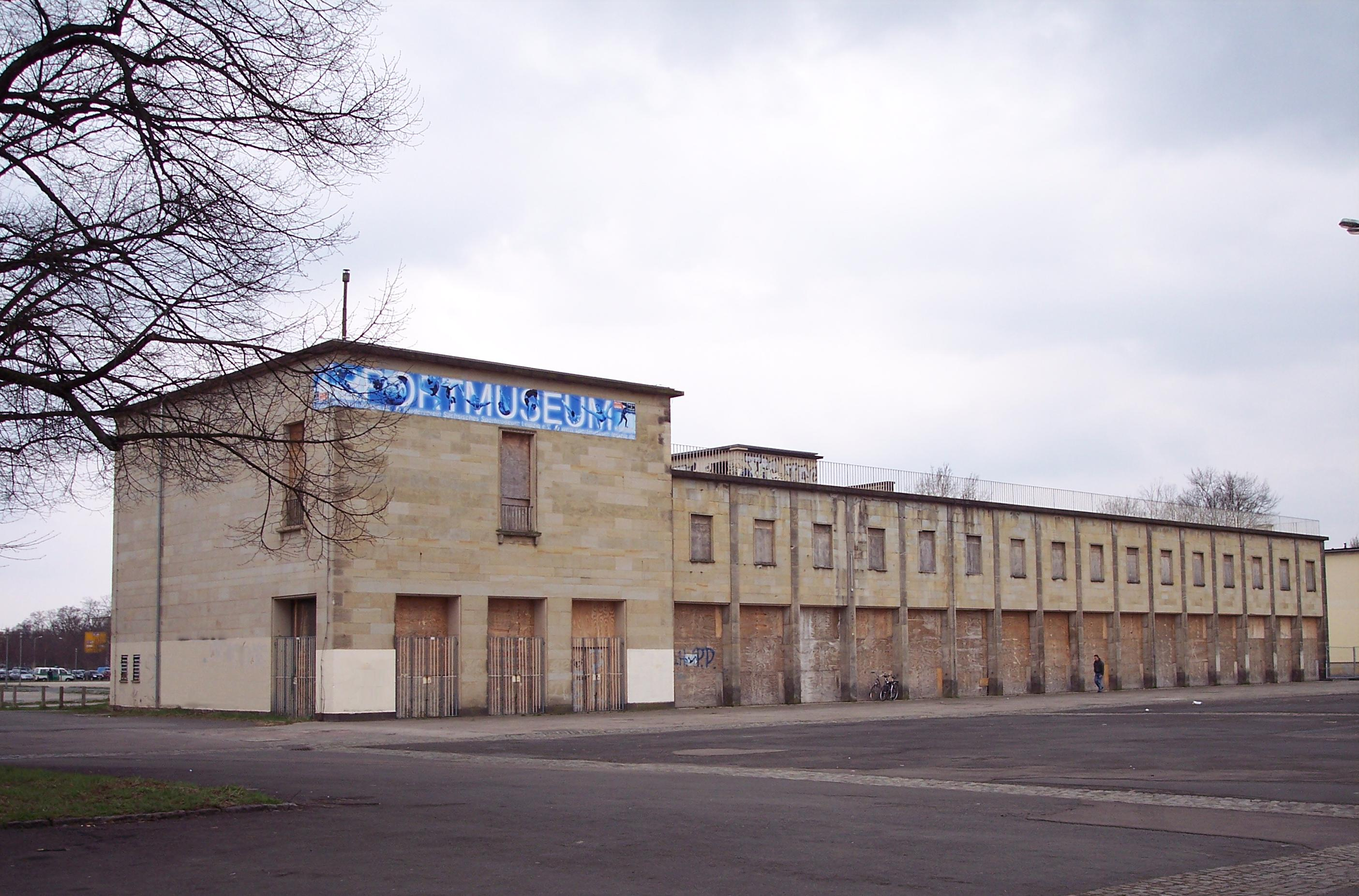 Nordtribüne mit Kassenhalle des ehemaligen Schwimmstadions Leipzig, geplantes Gebäude des Sportmuseums Leipzig